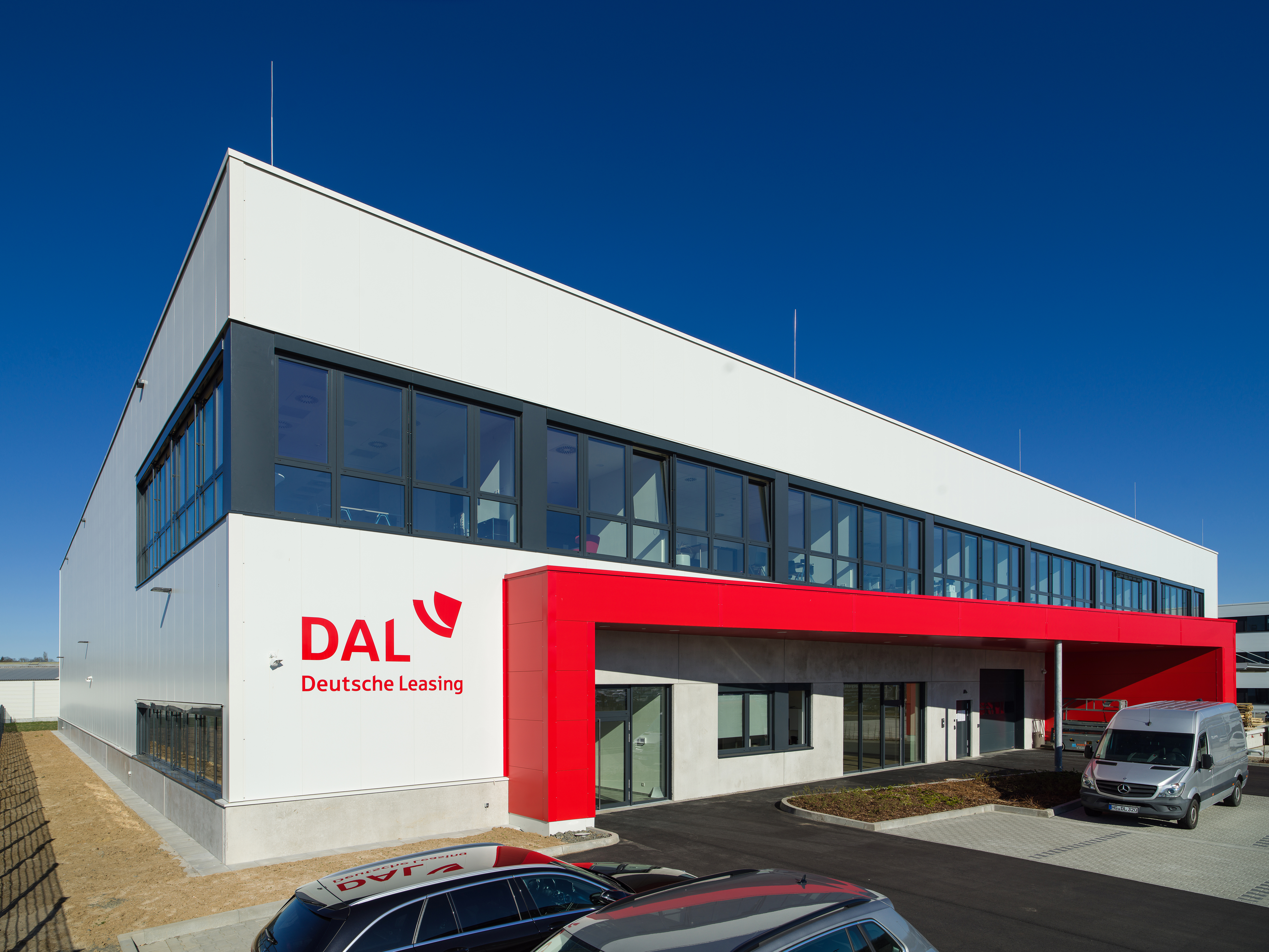 Das DAL Asset Service Center (ASC) in Fernwald